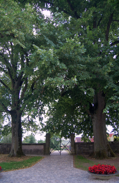 Linden am Friedhofseingang in Brettheim, Gemeinde Rot am See, Landkreis Schwäbisch Hall, Baden-Württemberg. Links zu sehen die Inschrift zum Gedenken an die 1945 erhängten Männer von Brettheim